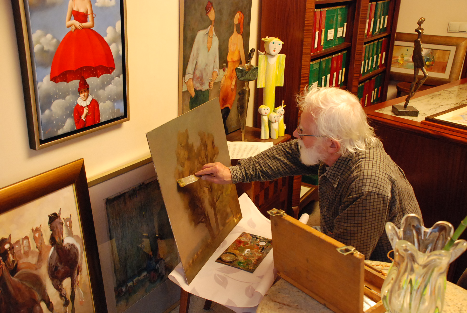 Stanisław Mazuś w Galerii Sztuki FOX